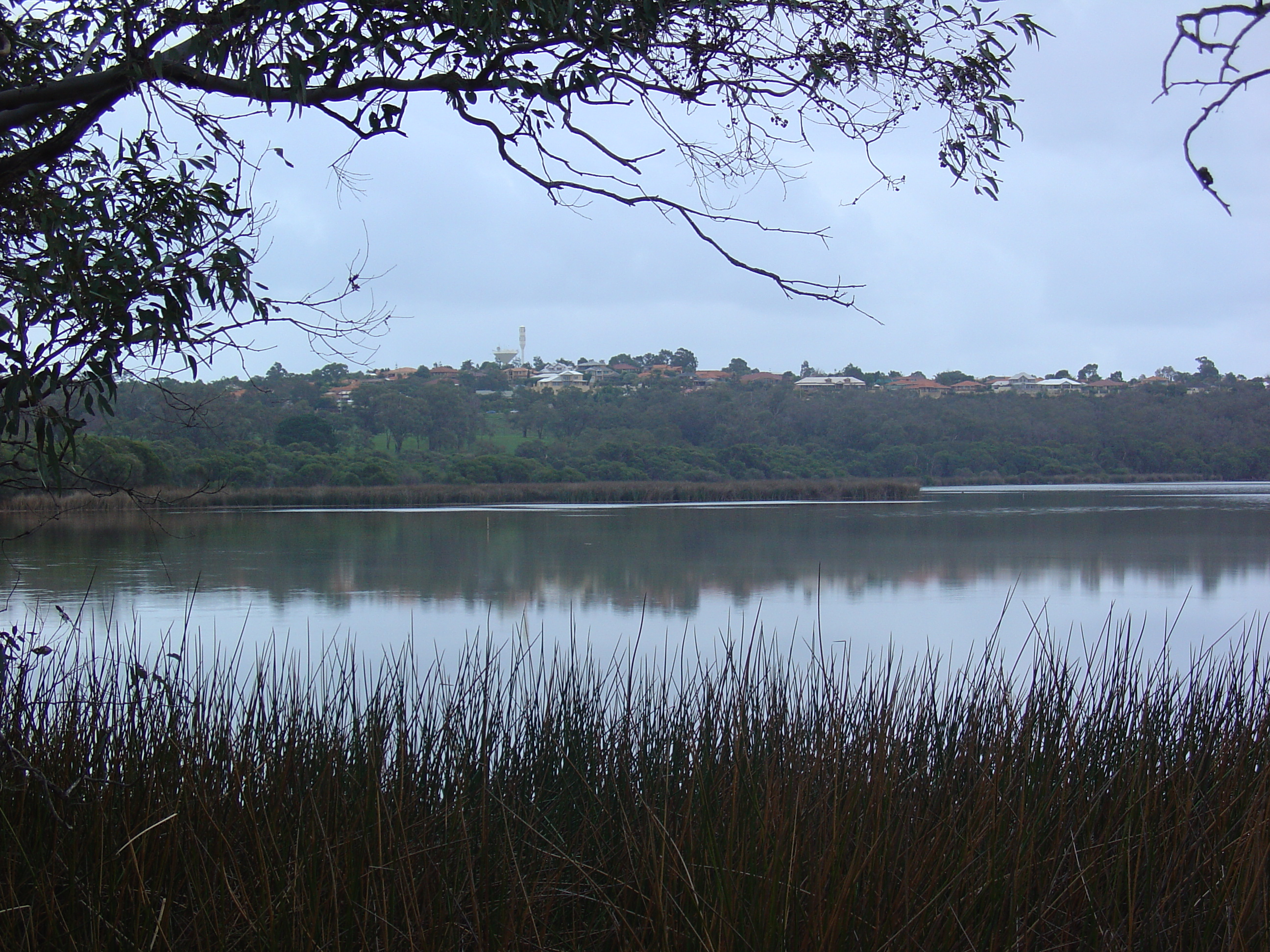 View over Lake Joondalup looking westward.